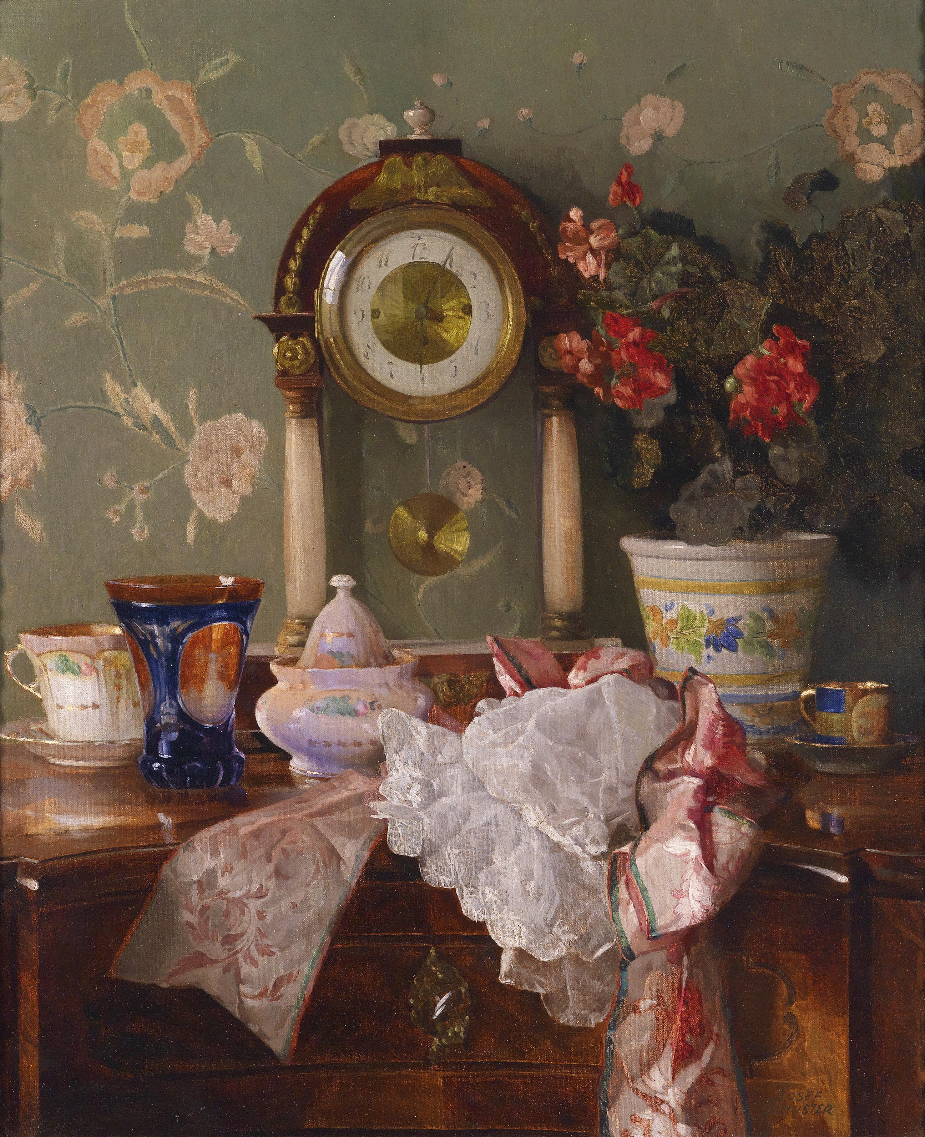 Antiquitätenstillleben mit Kaminuhr, signiert Josef Schuster, Öl auf Leinwand